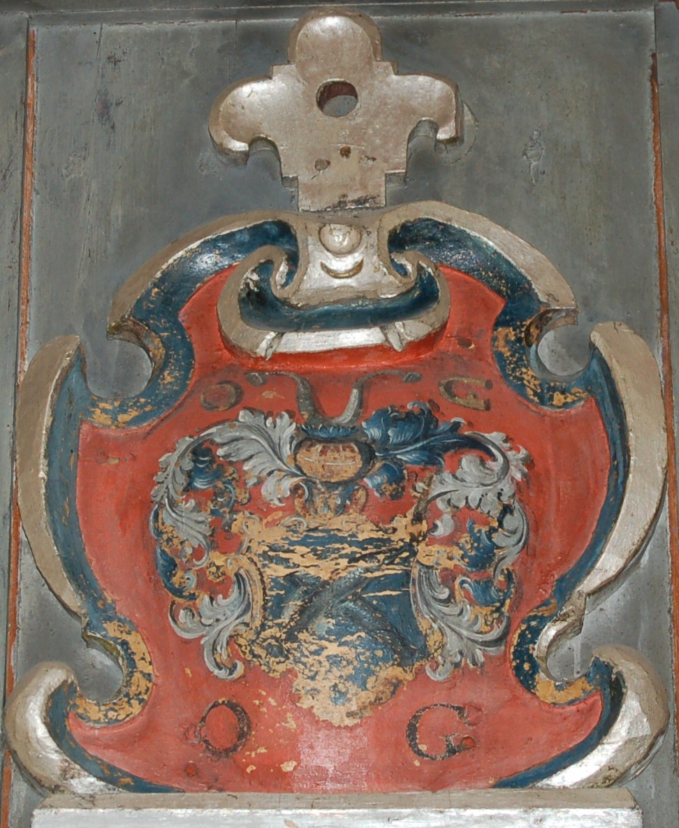 Ove Gjedde - våpen i Tjølling kirke (altertavle).